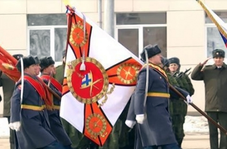 31 марта 2013 года 23 ОМСБр вручено Знамя нового образца